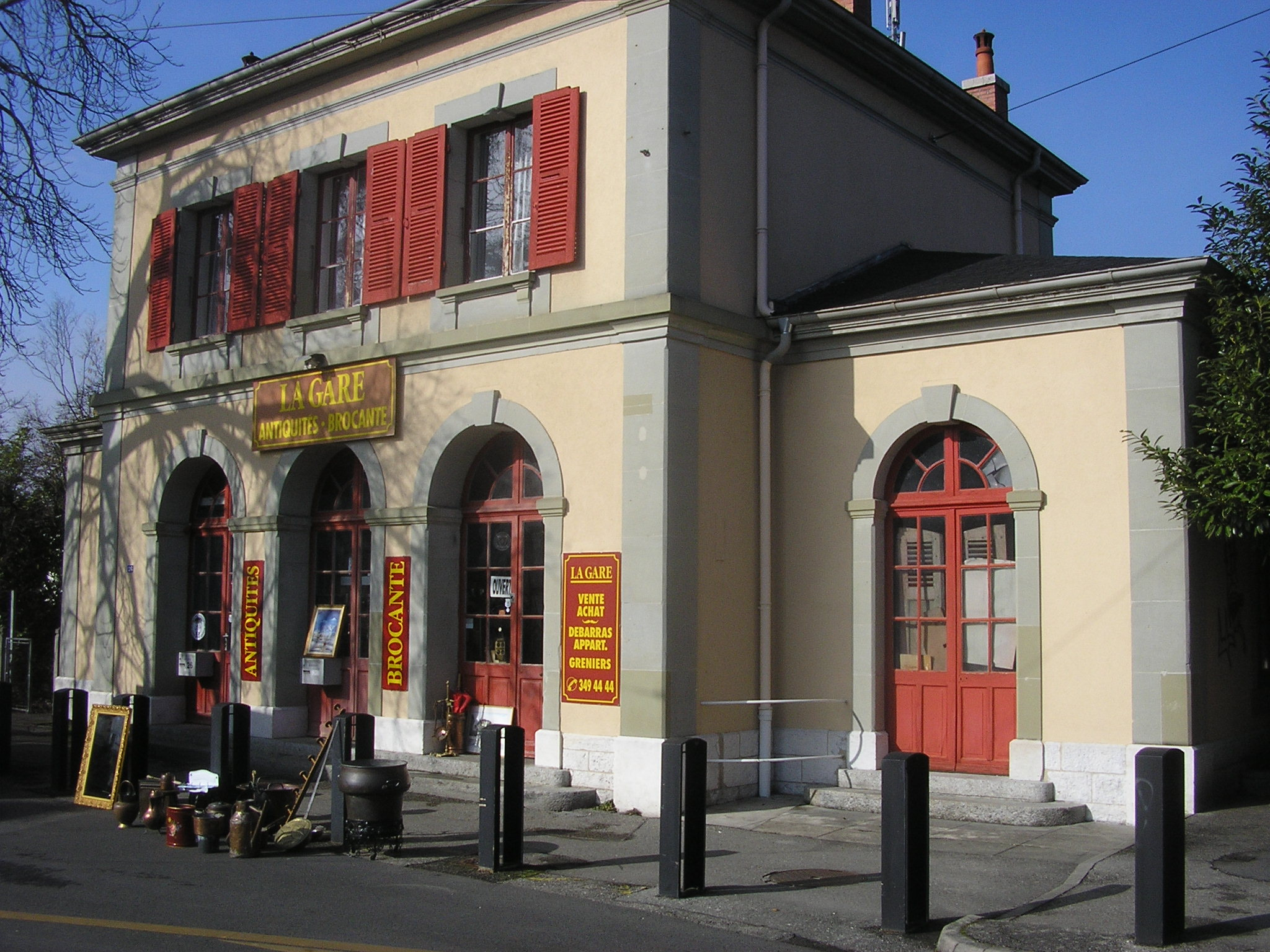 Gare de Chêne-Bourg, désaffectée